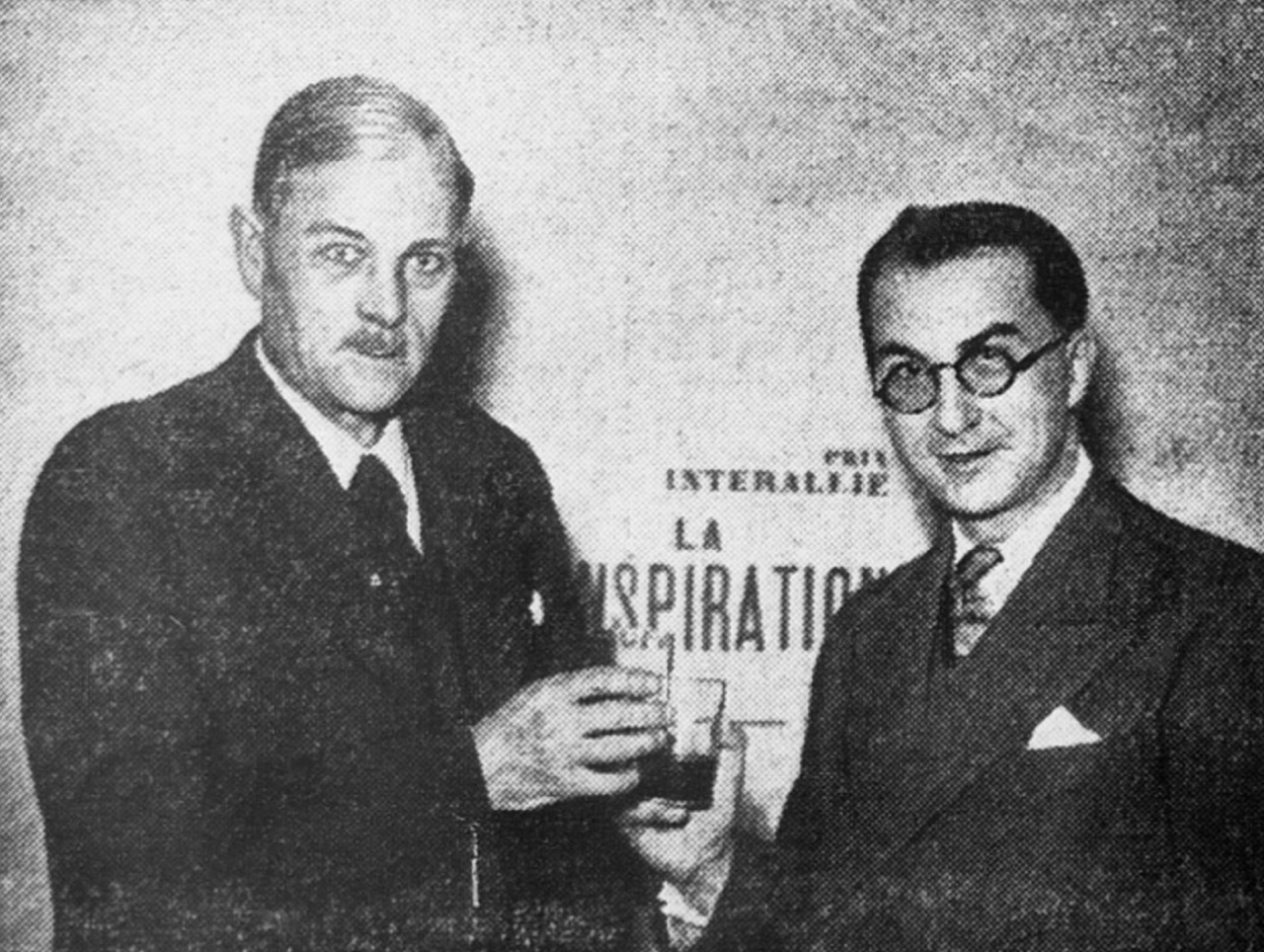 Paul Nizan, prix Interallié pour "La Conspiration", "L'Ouest-Éclair", 8 décembre 1938